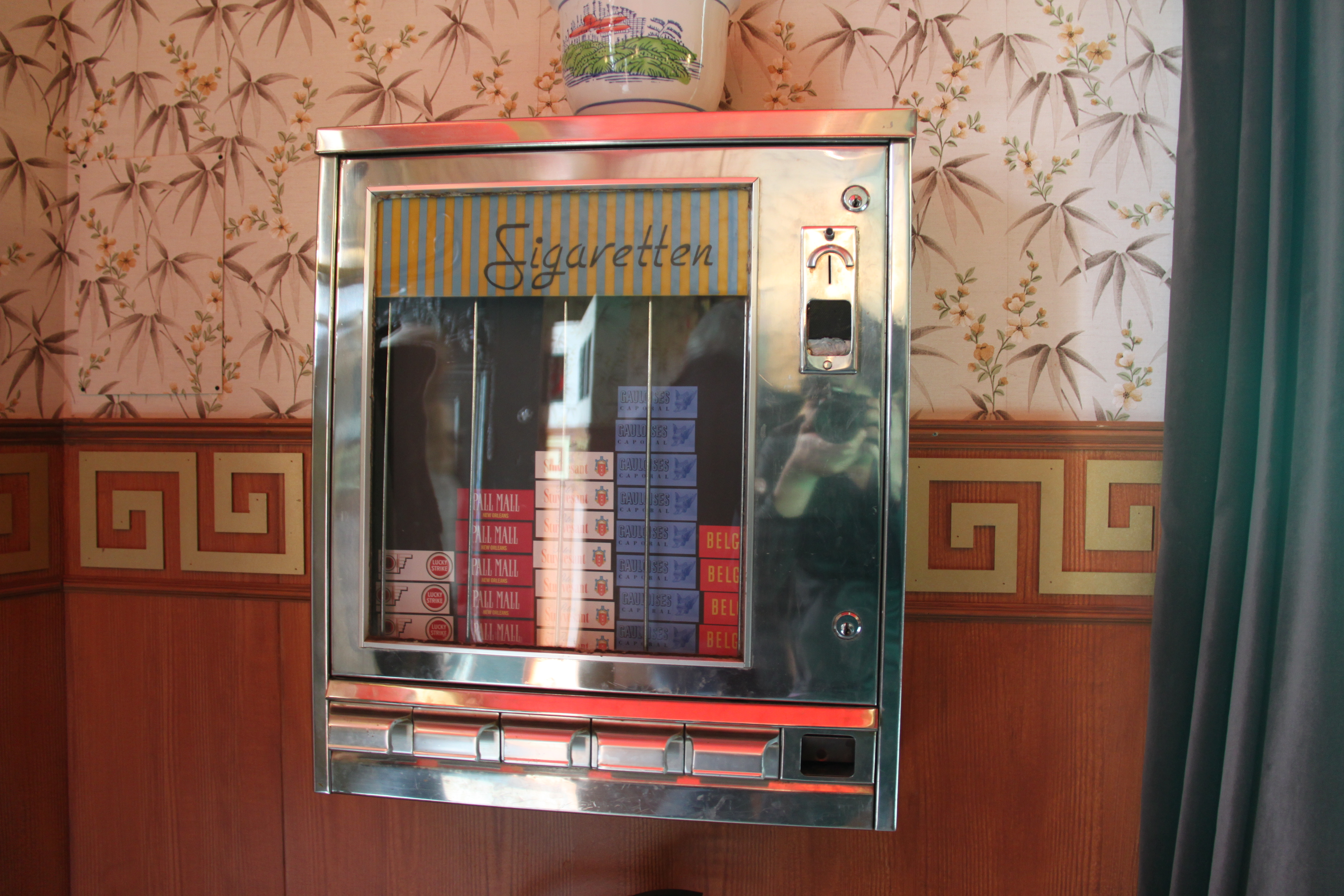 Een verouderde, niet-vergrendelde tabaksautomaat in het Nederlands Openluchtmuseum in Arnhem.